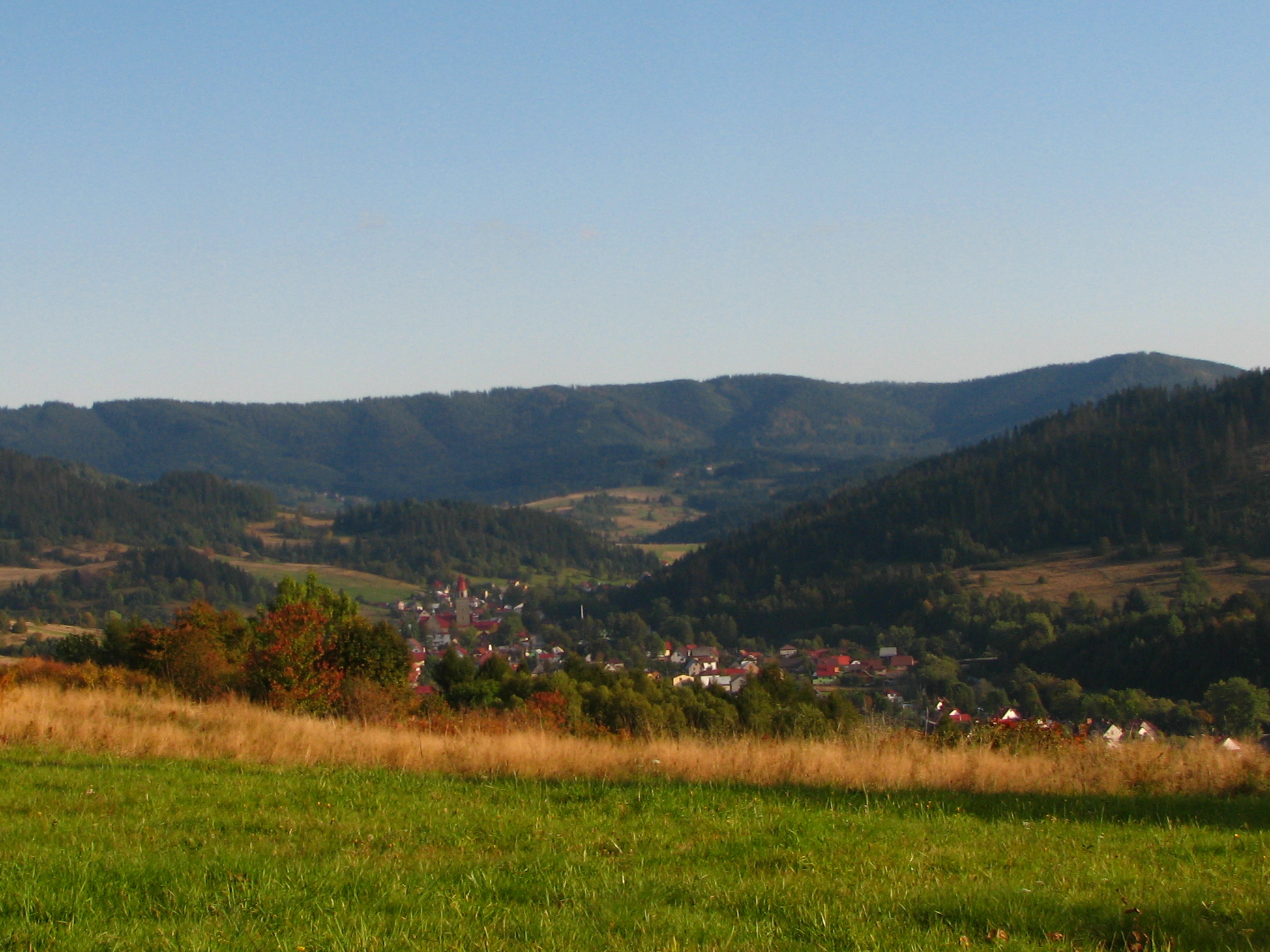 Ujsoły z Wilczego Gronia